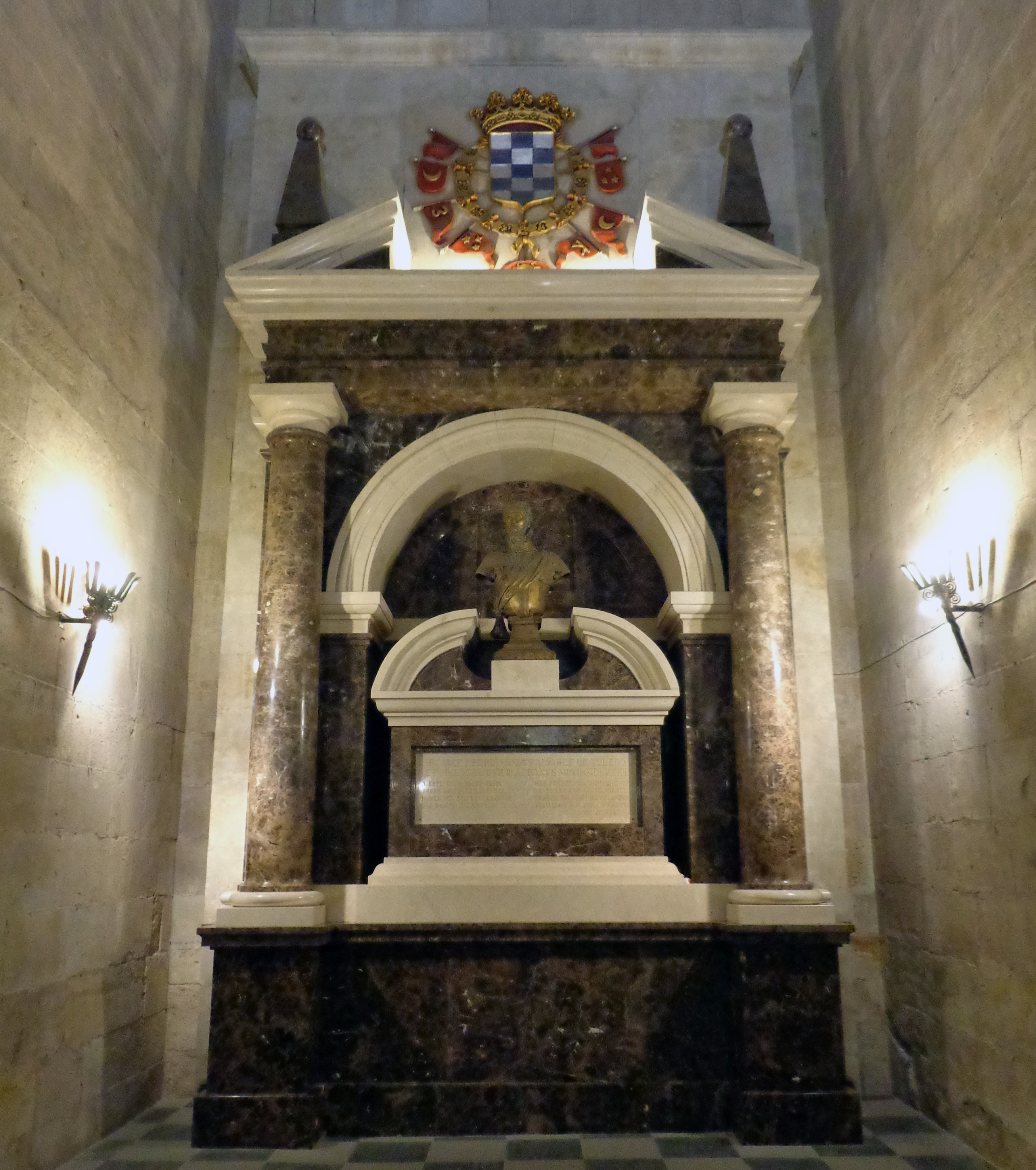 Tumba del III Duque de Alba. Convento de San Esteban, Salamanca